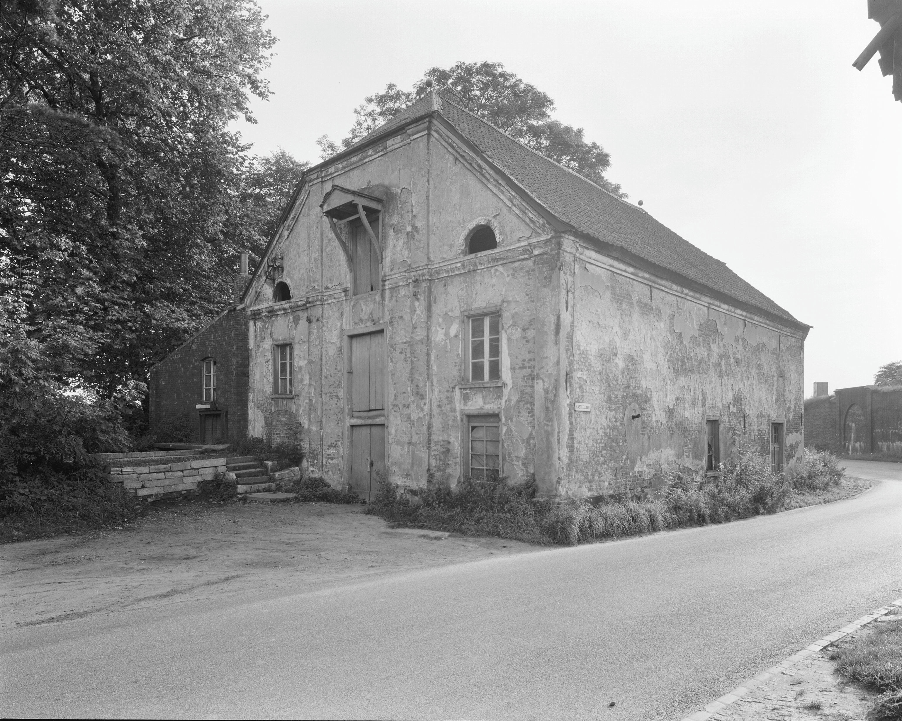 De Holtmeulen: Voorgevel en zijgevel van watermolen, het pleisterwerk is in slechte staat, de middentravee in de voorgevel heeft dubbele houten deuren en een hijskast, dak met wolfend